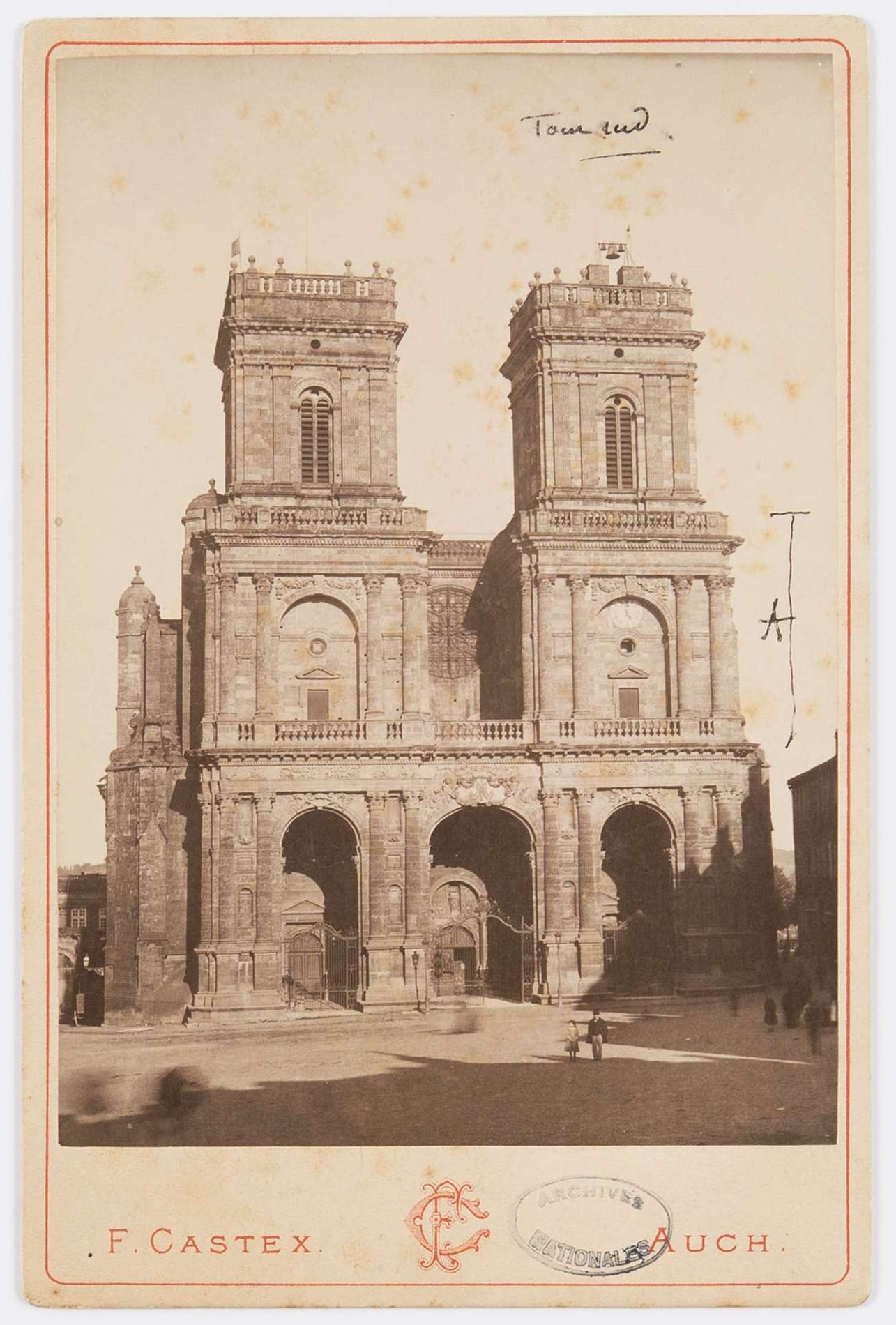 Restauration de la tour nord de la cathédrale : façade occidentale avec plusieurs passants sur le parvis. Photographié par F. Castex. Inscription manuscrite sur la photographie à l’encre noire : Tour sud et A avec un trait sur le côté droit de la tour. Échelle : 0,2 cm / 1 m. Photographie issue des dossiers de travaux de restauration des cathédrales (1802-1912, conservés aux Archives nationales (inventaire et documents numérisés consultables en ligne).